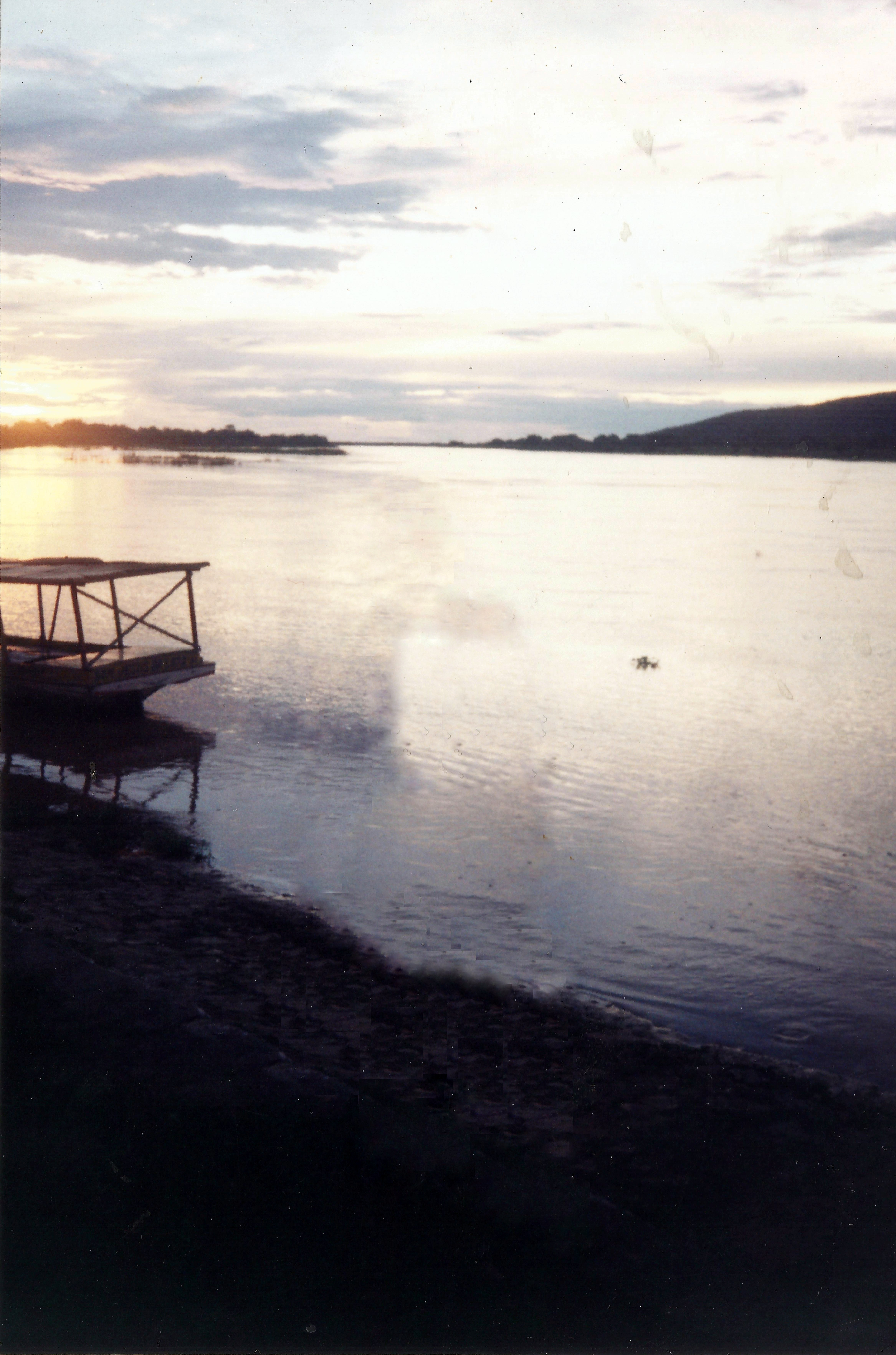 Porto da cidade de Paratinga, visto de outro lado,em 2003.